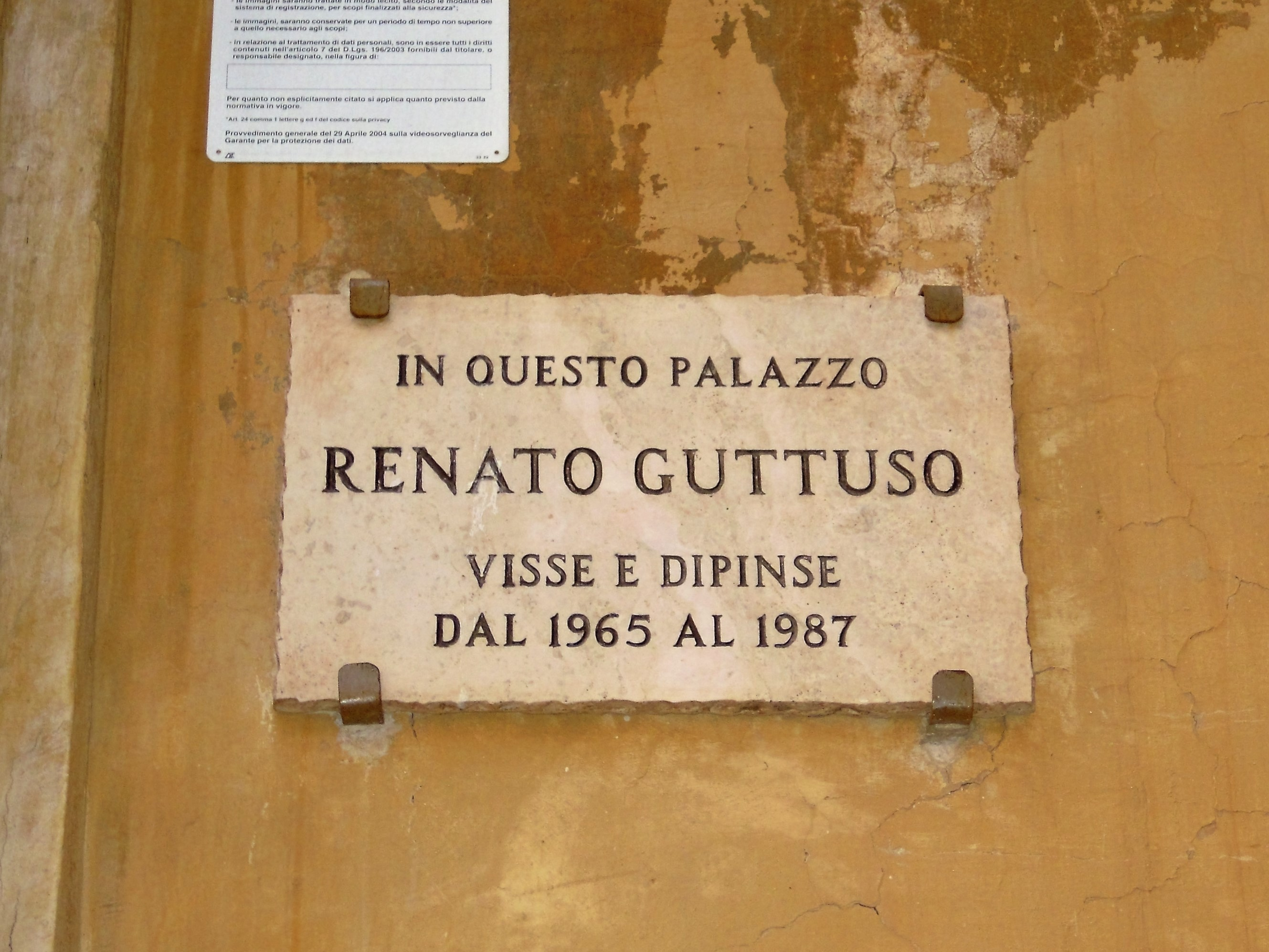 Roma, lapide commemorativa di Renato Guttuso in piazza del Grillo 5